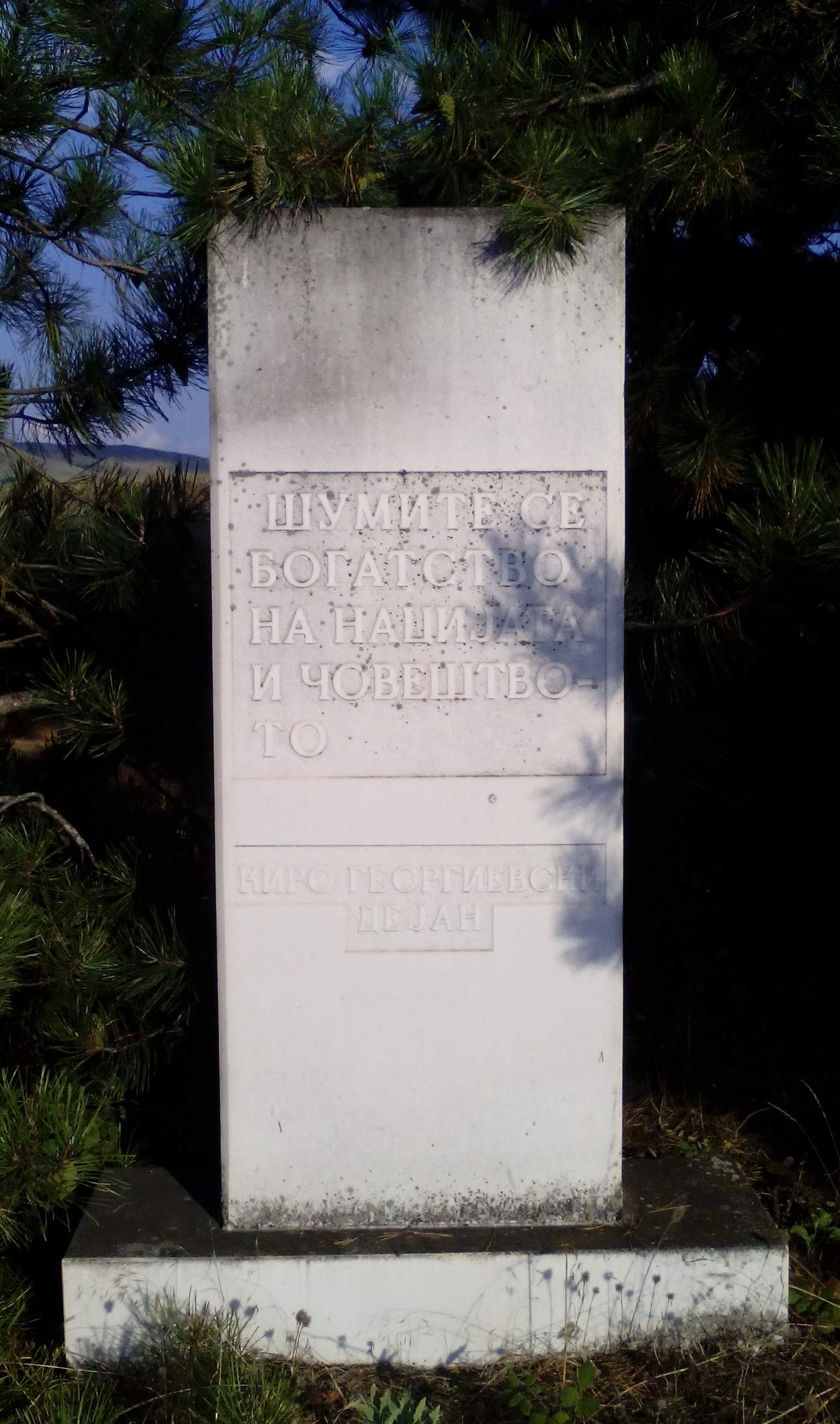 Споменик со цитат од Киро Георгиевски - Дејан на патот Битола-Прилеп